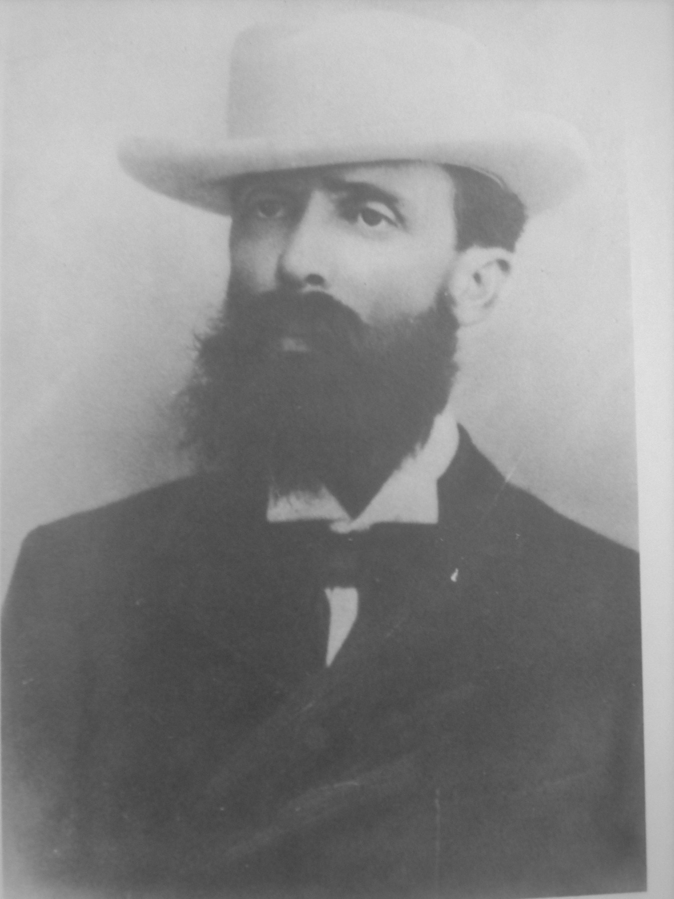 Fotografia familiar.